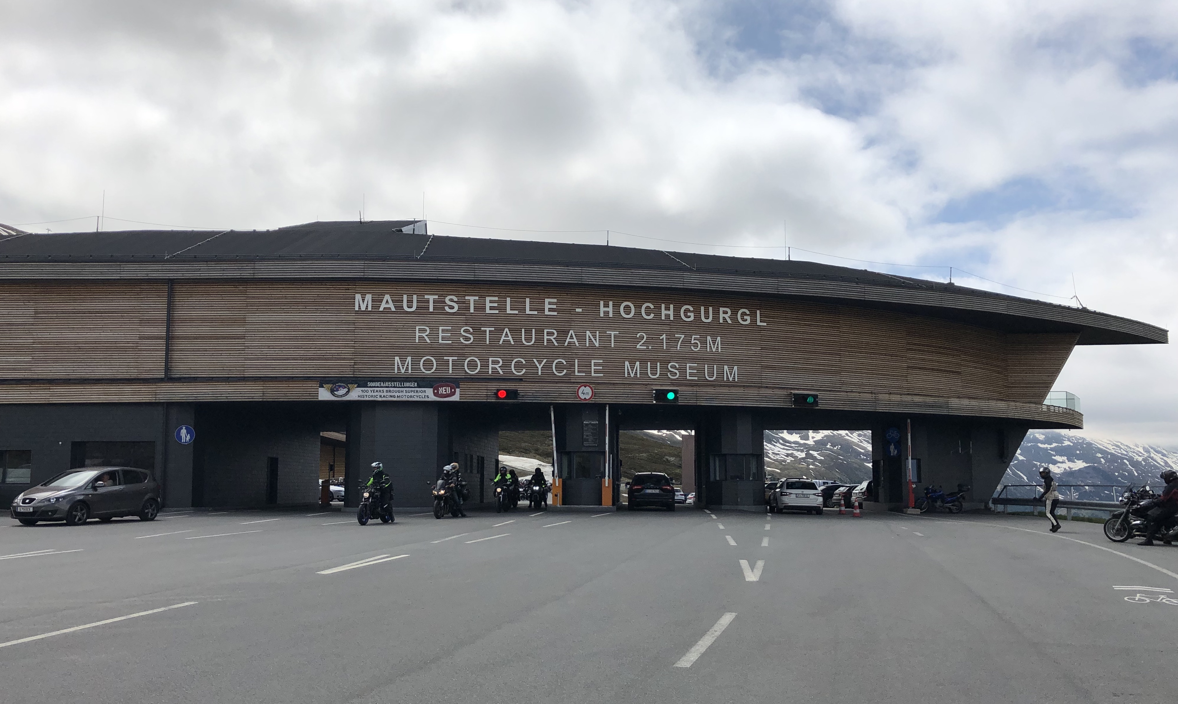 Maustelle auf dem Timmelsjoch